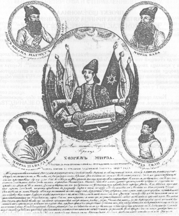 “Извинительная речь” принца Хозрев-Мирзы, произнесенная в Петербурге 10 августа 1829 г.